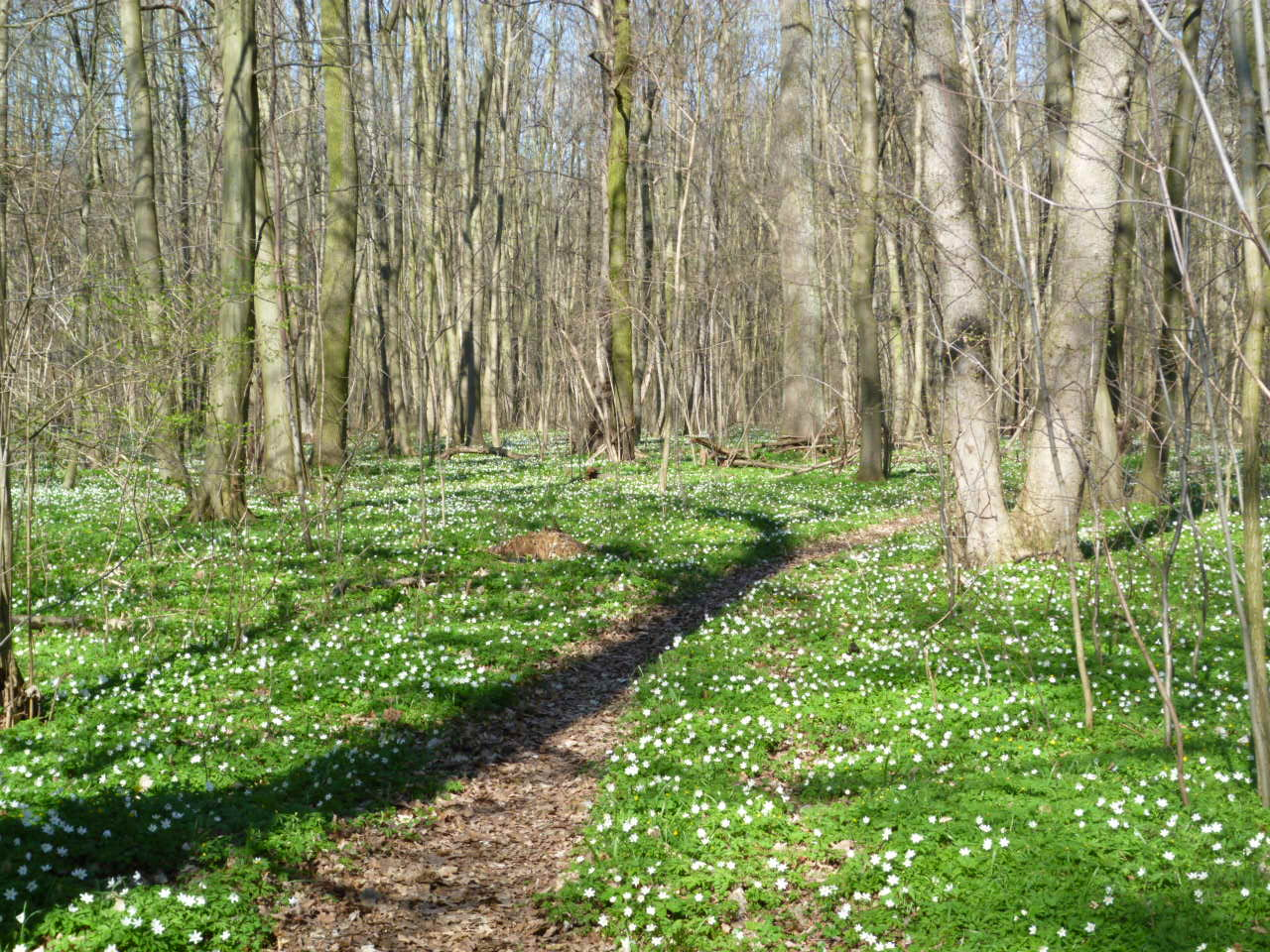 Rantenhorst an der Grenze zum Schierholz, Bereich im Naturschutzgebiet „Klüdener Pax-Wanneweh“ in Sachsen-Anhalt